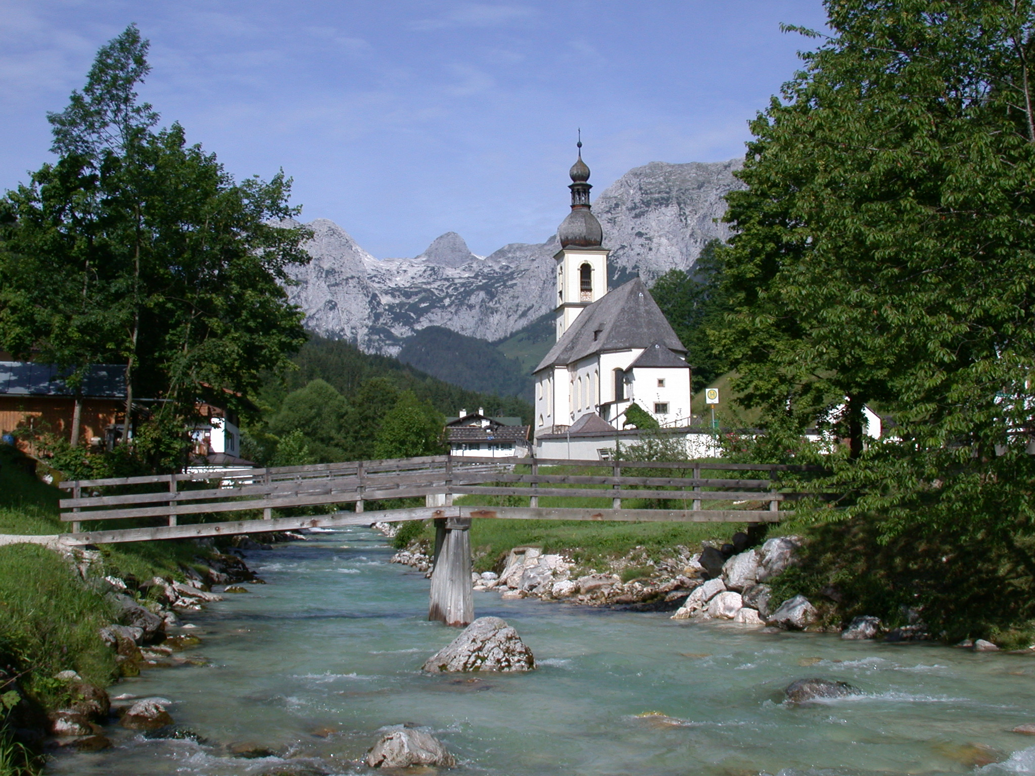 Eglise de Ramsau bei Berchtesgaden (Allemagne]